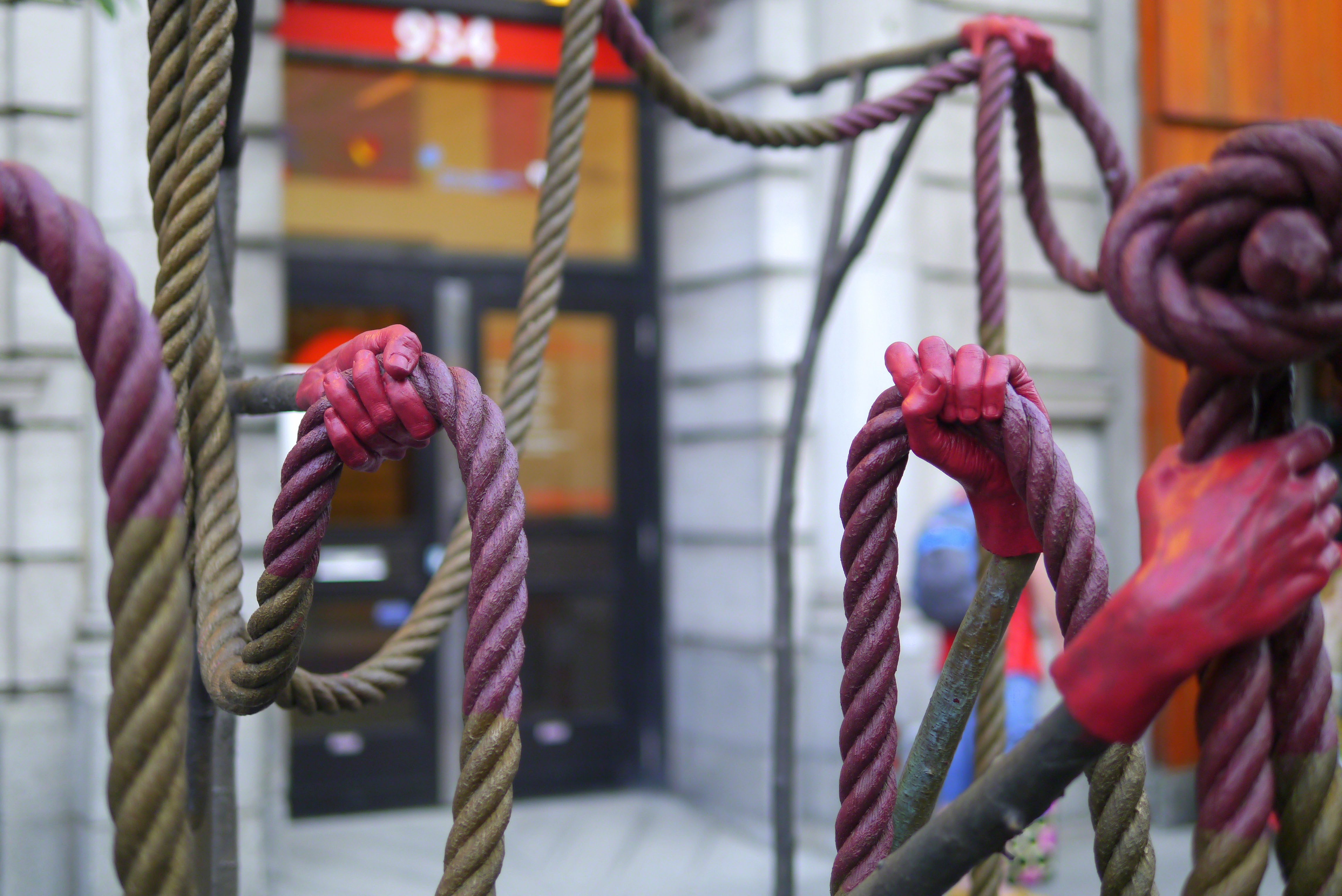 Aires Libres, rue Sainte-Catherine, Montréal Les sculptures de Valérie Blass sont le fruit de stratégies visant à tromper la reconnaissance des éléments figurés et à brouiller les réflexes de projection narrative. Par des jeux d’anthropomorphismes et d’interchangeabilité formelle, l’artiste évacue la distinction entre abstraction et figuration pour mettre de l’avant une ambivalence, voire une surenchère de sens, qui fait basculer les points de repères du spectateur. Dans le cadre d’Aires Libres 2014, Blass présente Rope dope grope nope pope. À travers ce grand dessin de cordes dans l’espace apparaissent des mains, incarnant l’action, la volonté et le caractère, qui soulignent la malléabilité sémantique et la posture particulière qui se dégagent de la structure en suspension. L’intérêt de l’artiste pour la déconstruction du corps et la présentation d’éléments isolés, ici les mains, participe d’une recherche continue sur les synecdoques, sur la manière dont la partie renvoie au tout. Ces mains deviennent ainsi des corps partiellement invisibles, en tension avec la grande souplesse des cordes déployées. Comme dans de nombreuses oeuvres de l’artiste, la matière semble procéder d’un élan intérieur, d’un mouvement inconnu qui évoque une forte intention. Valérie Blass est représentée par la Galerie Parisian Laundry à Montréal. Depuis plus de dix ans, ses œuvres sont présentées à l’échelle nationale et internationale et font partie de nombreuses collections publiques et privées. Sa première expo solo à New York en 2013 à la galerie The Hole a été saluée par la critique. Rope dope grope nope pope est la première œuvre d’art public canadienne de Valérie Blass. Elle vit et travaille à Montréal. Aseman Sabet Commissaire